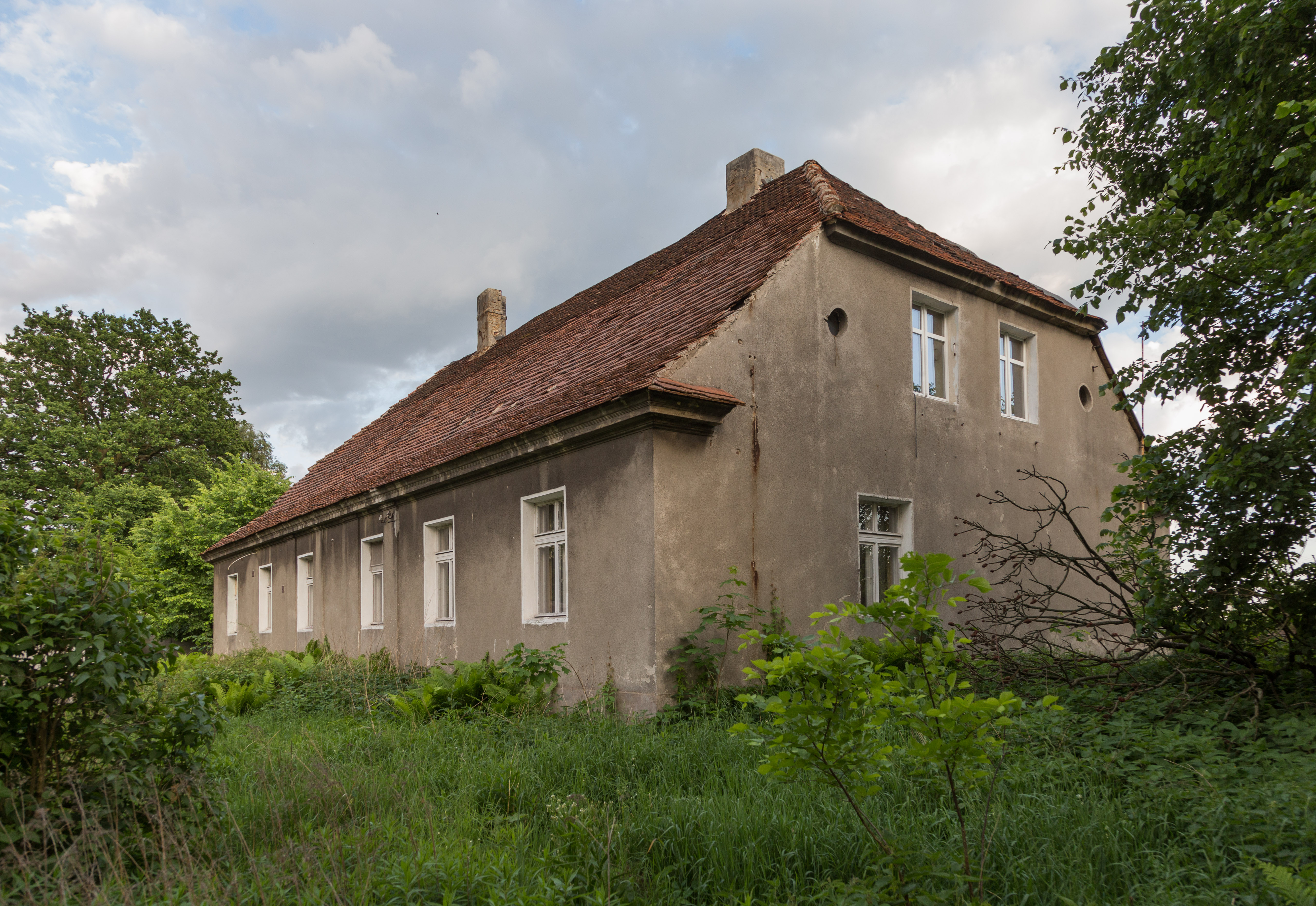 Dwór w dawnym folwarku Katarzynka, należącym w końcu XVIII w. do Samuela Lutra Gereta, burmistrza Torunia, później do Christiana Elsnera. Widok od strony północno-wschodniej.